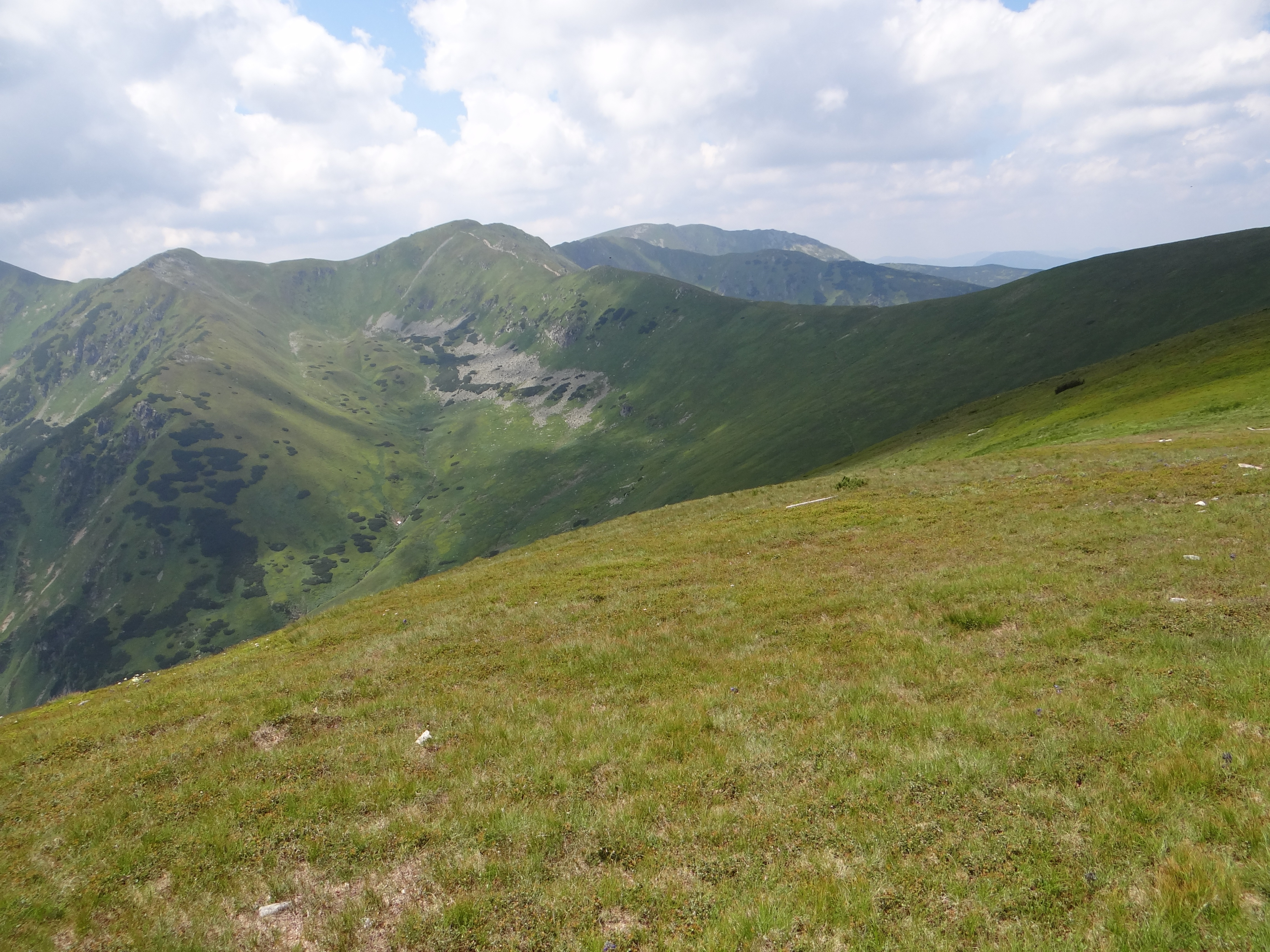 Chabenec